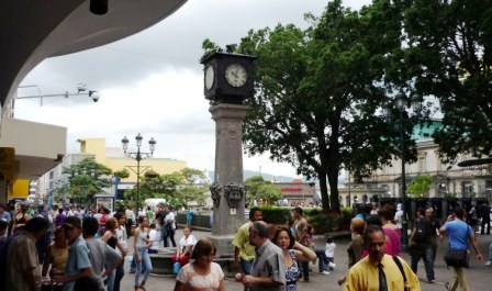 Acceso a la Plaza de la Cultura desde el Bulevar de la Avenida Central. San José, Costa Rica.